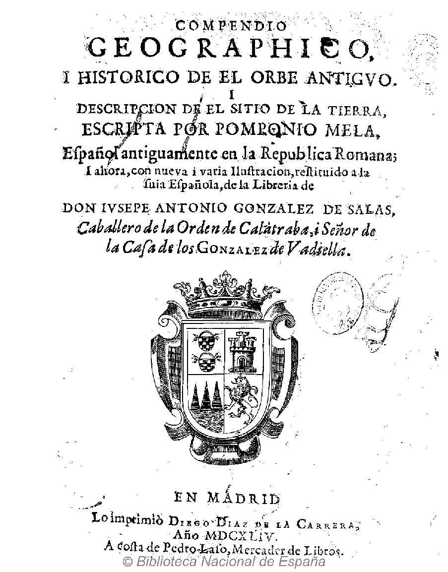 De chorographia. Título: Compendio geographico i historico de el orbe antiguo i descripcion de el sitio de la tierra escripta por Pomponio Mela ... ; i ahora, con Nueva i varia ilustracion, restituído a la suia española, de la libreria de don Iusepe Gonzalez de Salas ... Autor: Mela, Pomponio. González de Salas, José Antonio (1592-1651) Fecha: 1644 Datos de edición: En Madrid lo imprimió Diego Diaz de la Carrera (Díaz de la Carrera, Diego (fl. 1637-1667)) a costa de Pedro Laso